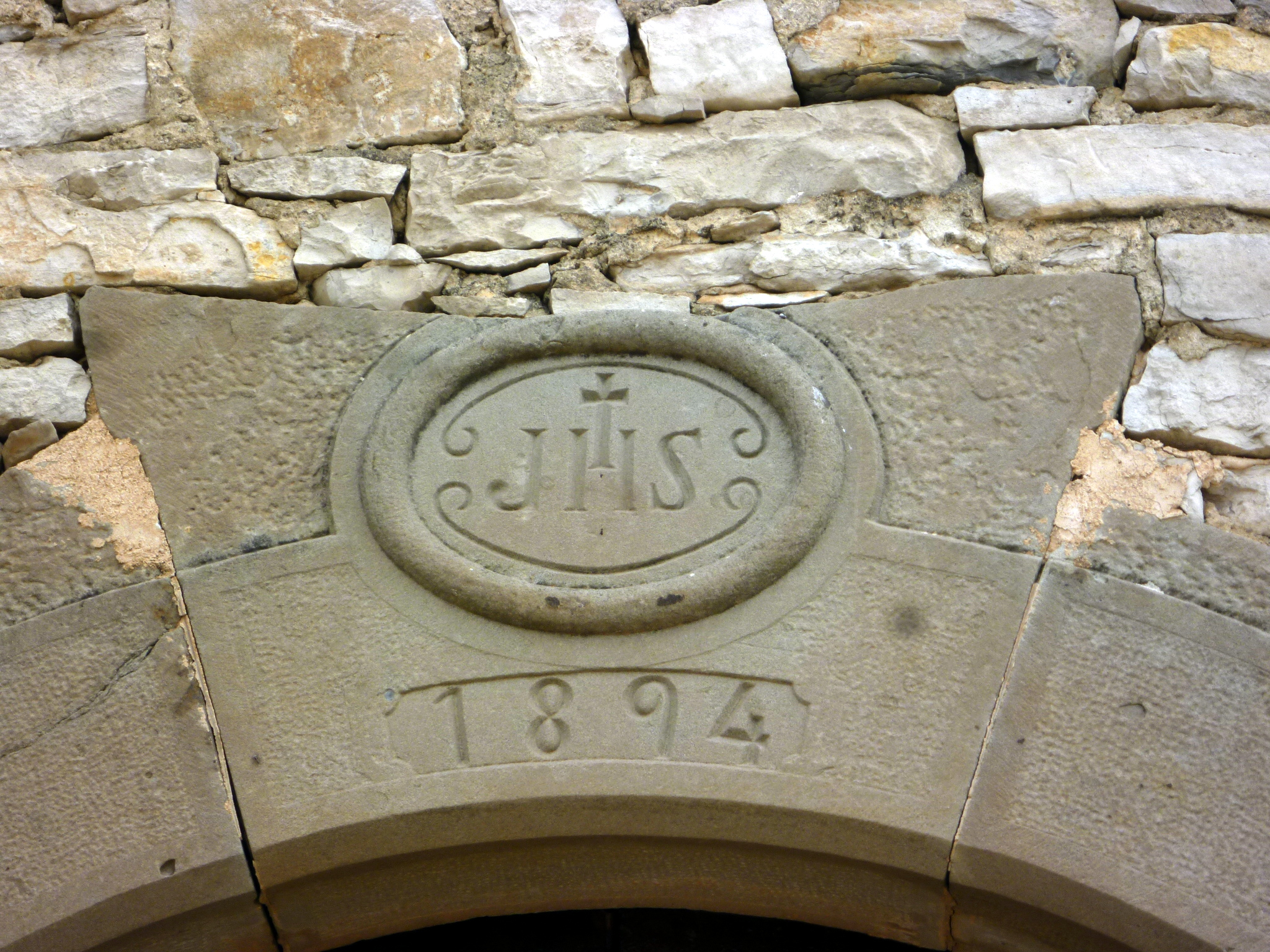 Ermita de Sant Salvador d'Altadill (Sant Guim de Freixenet), clau de la portada